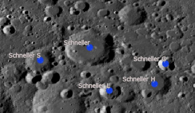 Cráter lunar Schneller. Cráteres satélite. (Imagen LRO)